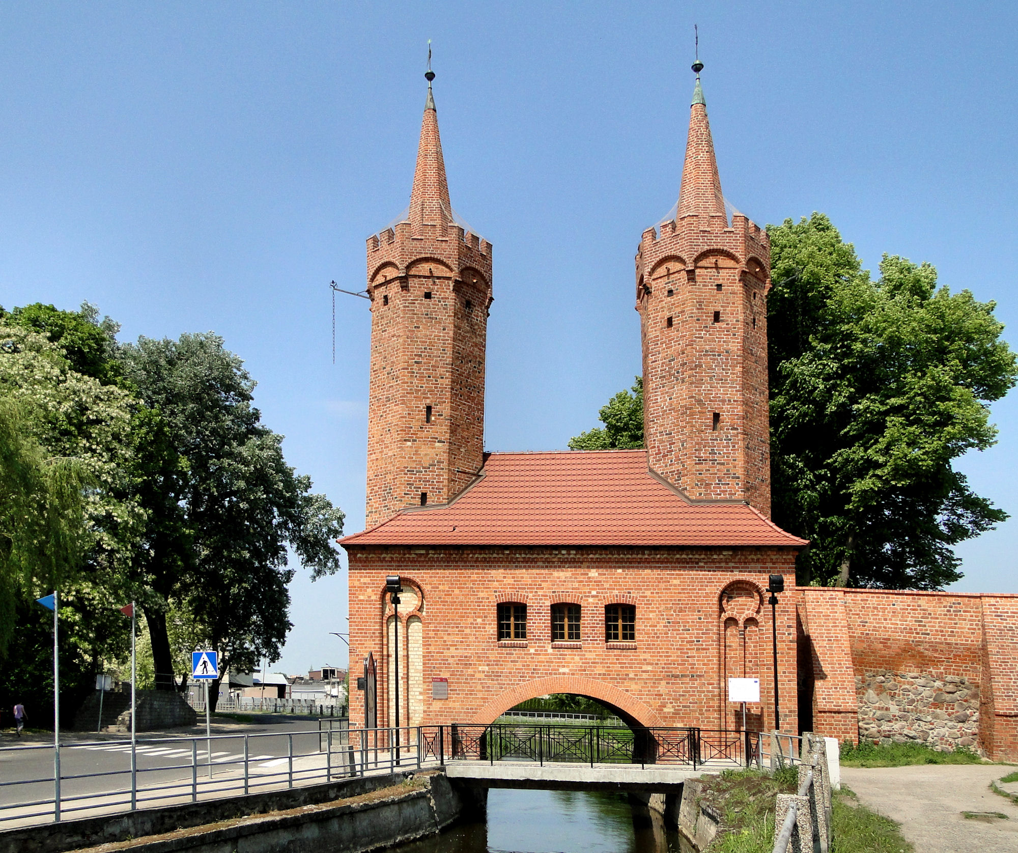 Brama Młyńska (Portowa) w Stargardzie Szczecińskim